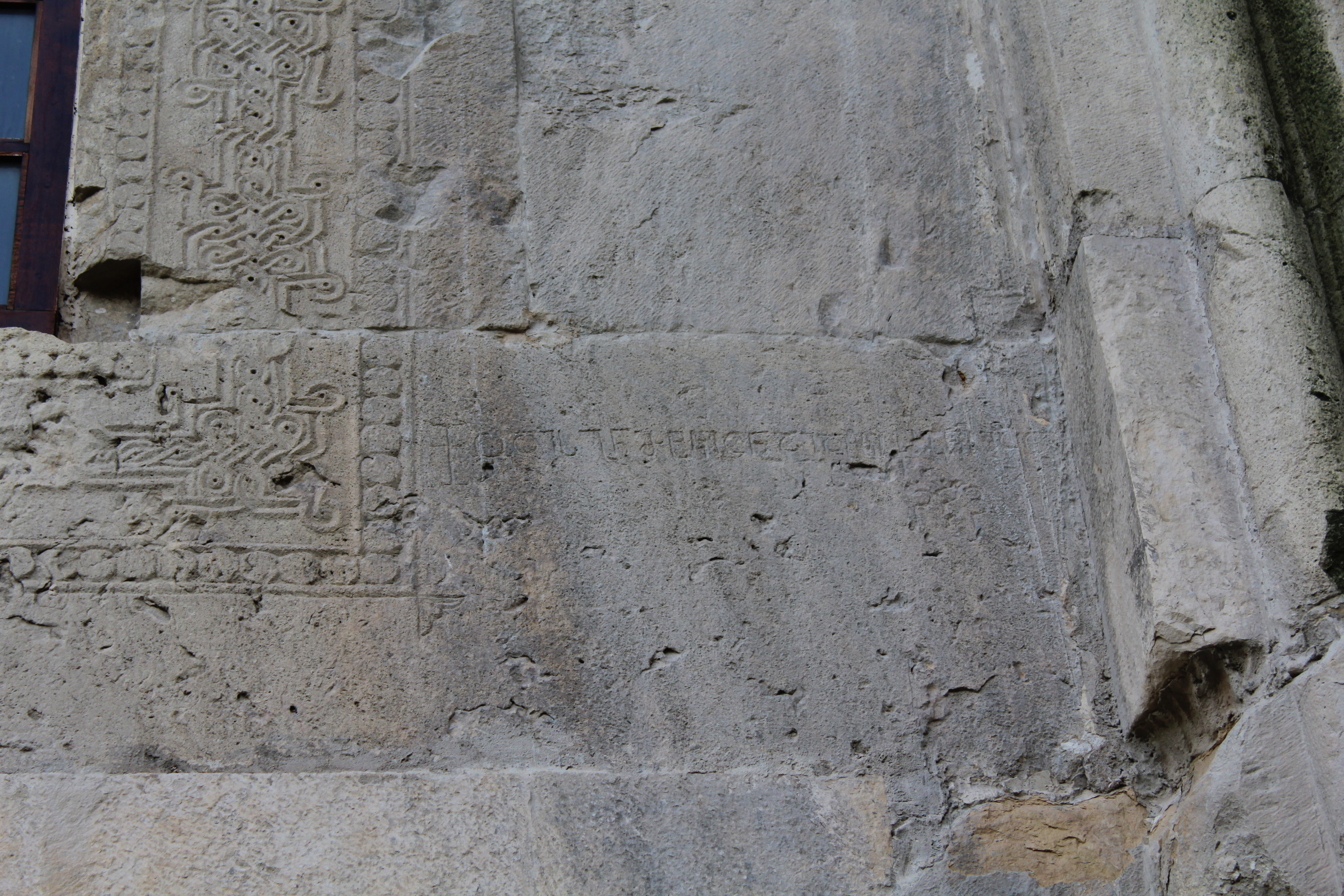 ბაგრატის ტაძრის სამშენებლო წარწერა — „ოდეს განმტკიცნა იატაკი. ქორონიკონი იყო 223“.